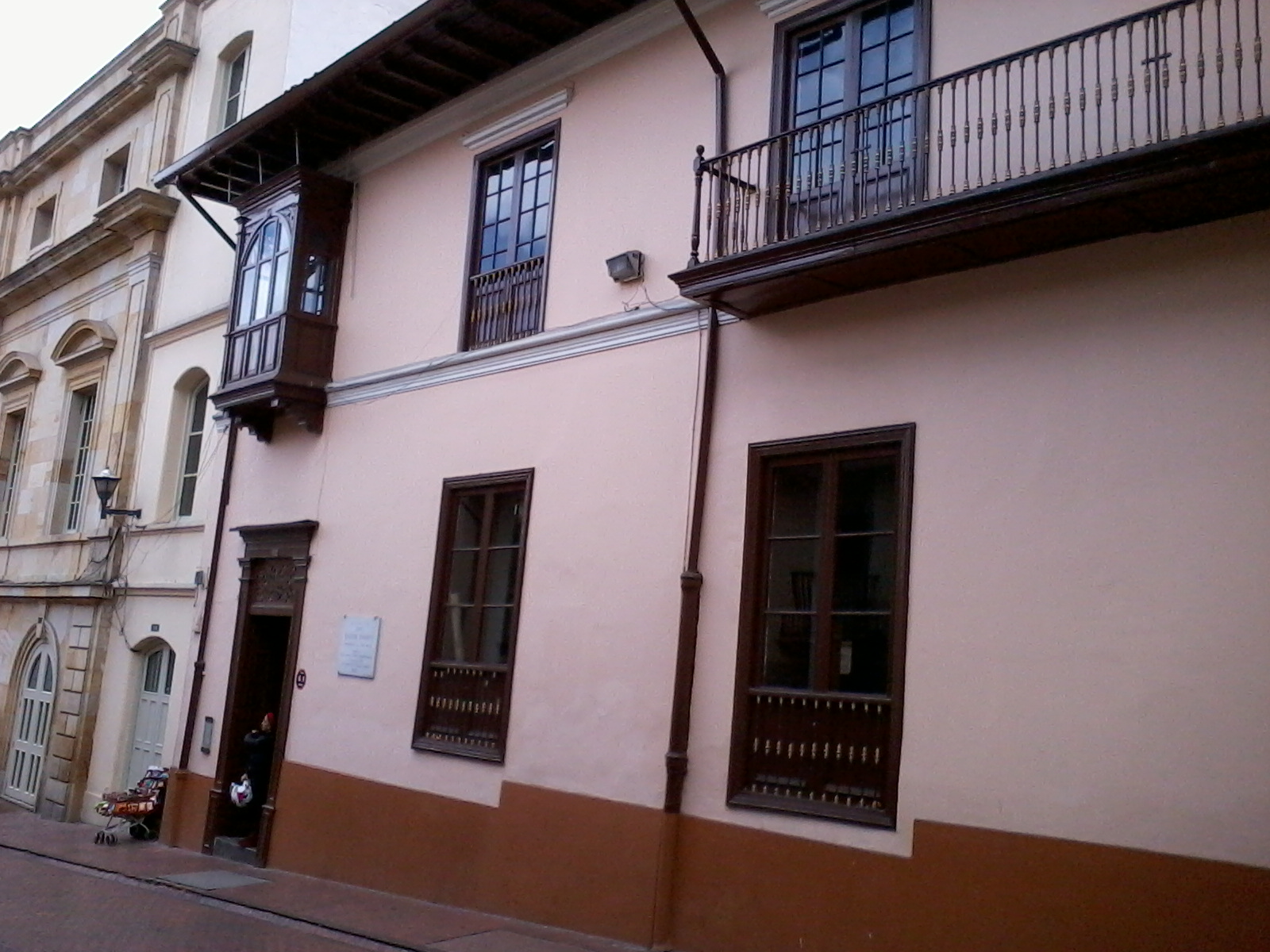 Casa donde nació Rafael Pombo. Fundación Rafael Pombo, biblioteca infantil. Carrera 5 N° 10-03, Bogotá (Colombia)